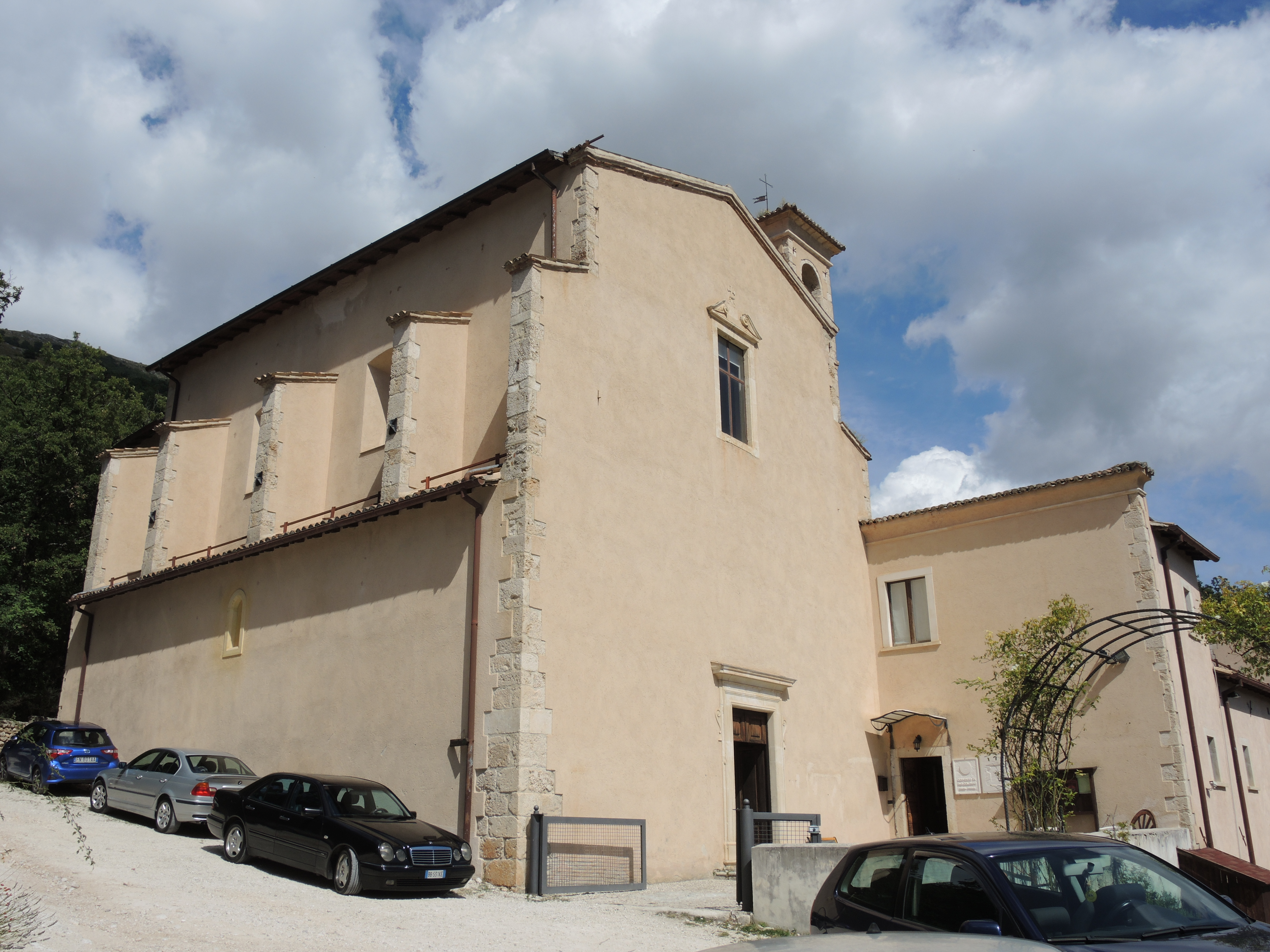 Barisciano (AQ): Convento di San Colombo